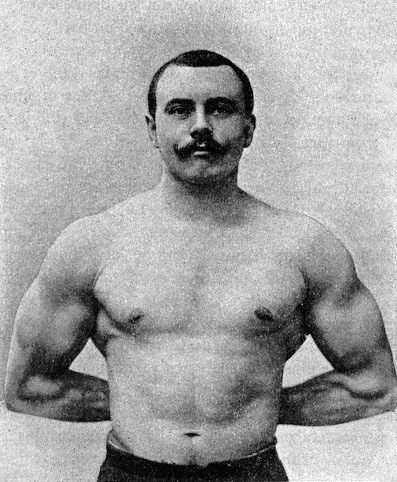 Edmond Desbonnet (1867–1953)